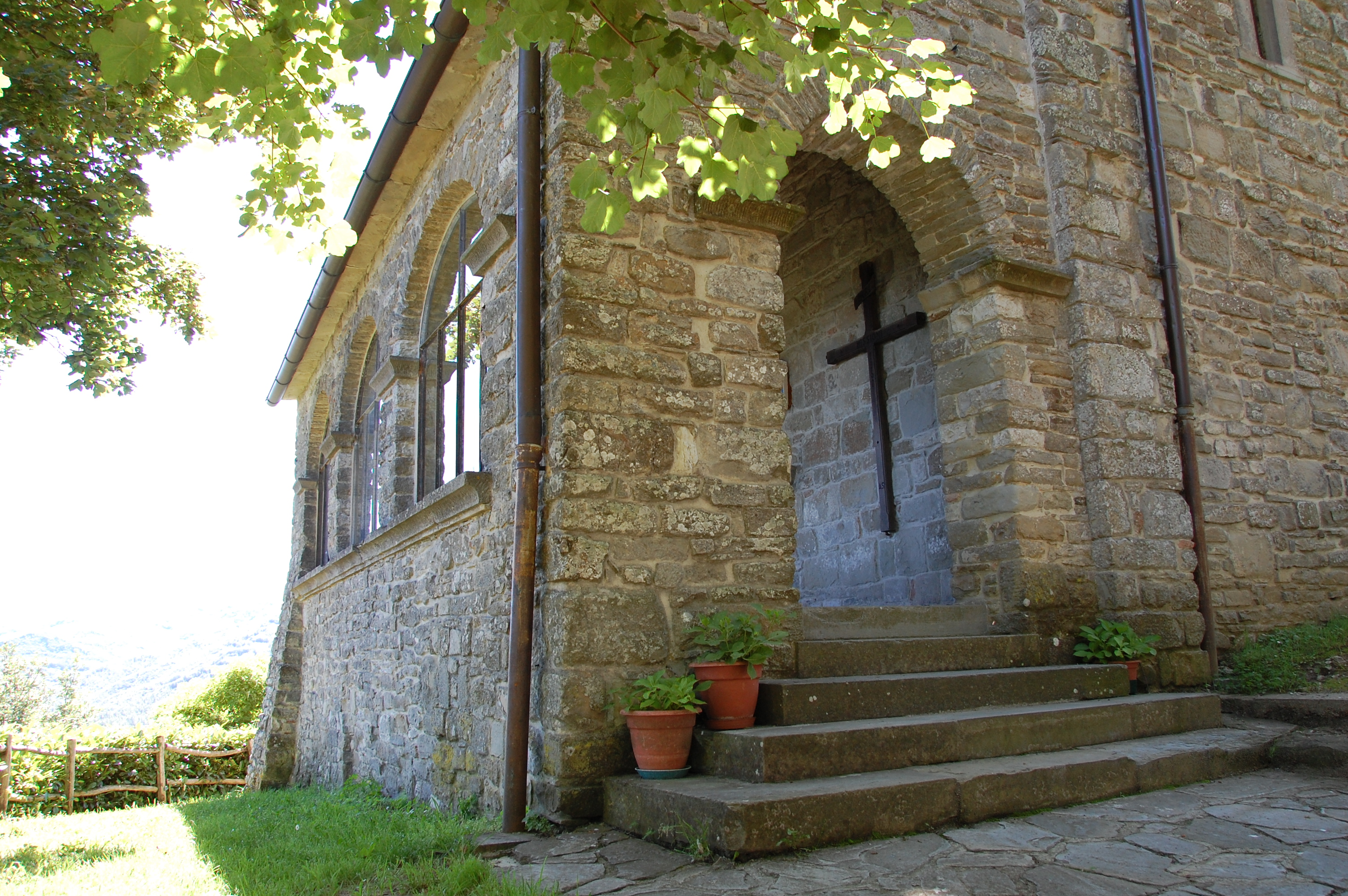 Particolare dell'entrata della chiesa di San Michele Arcangelo a Badia Tedalda